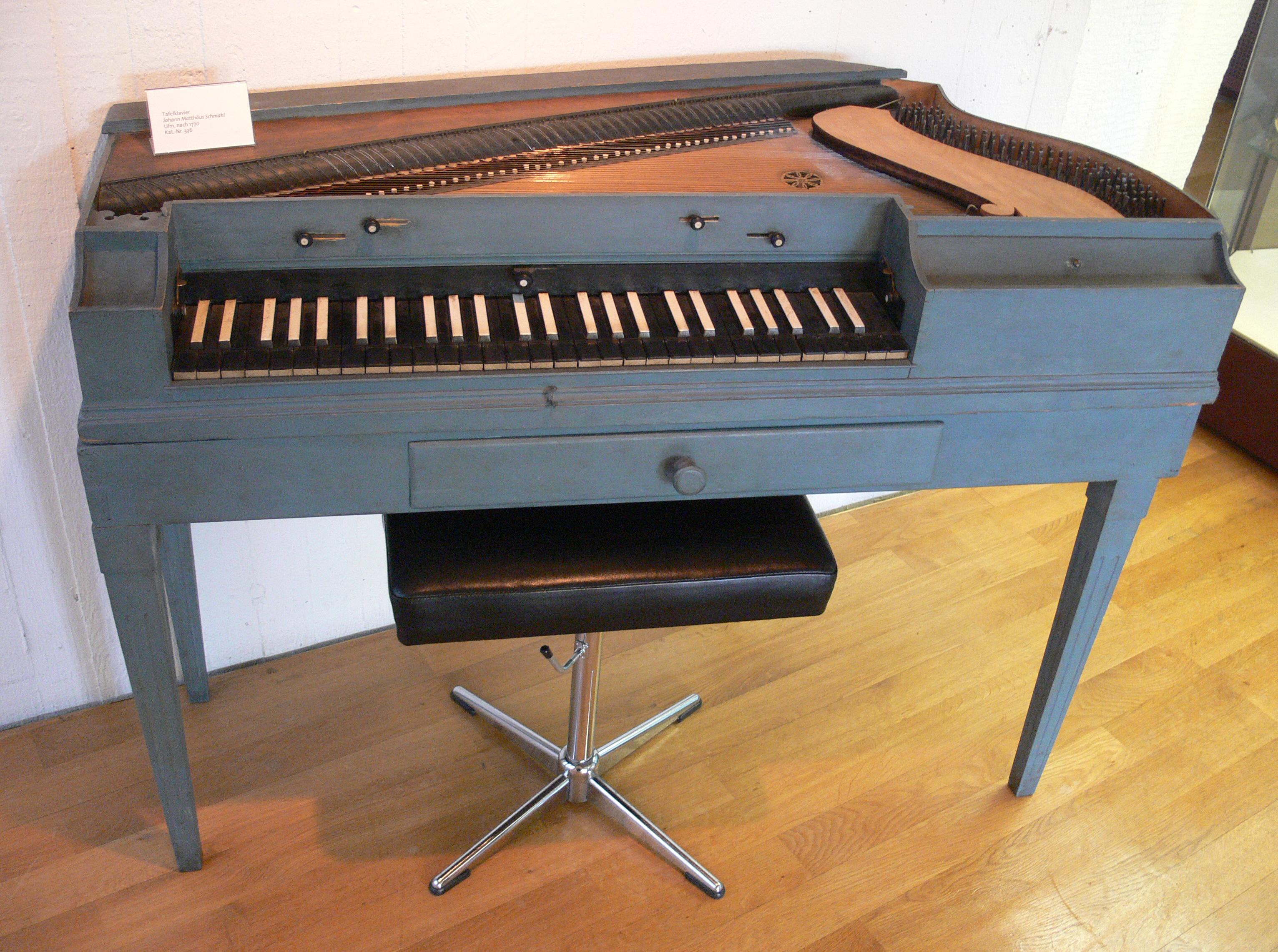 Tafelklavier, Johann Matthäus Schmahl, Ulm nach 1770 Musikinstrumentenmuseum Berlin, Kat.-Nr. 336